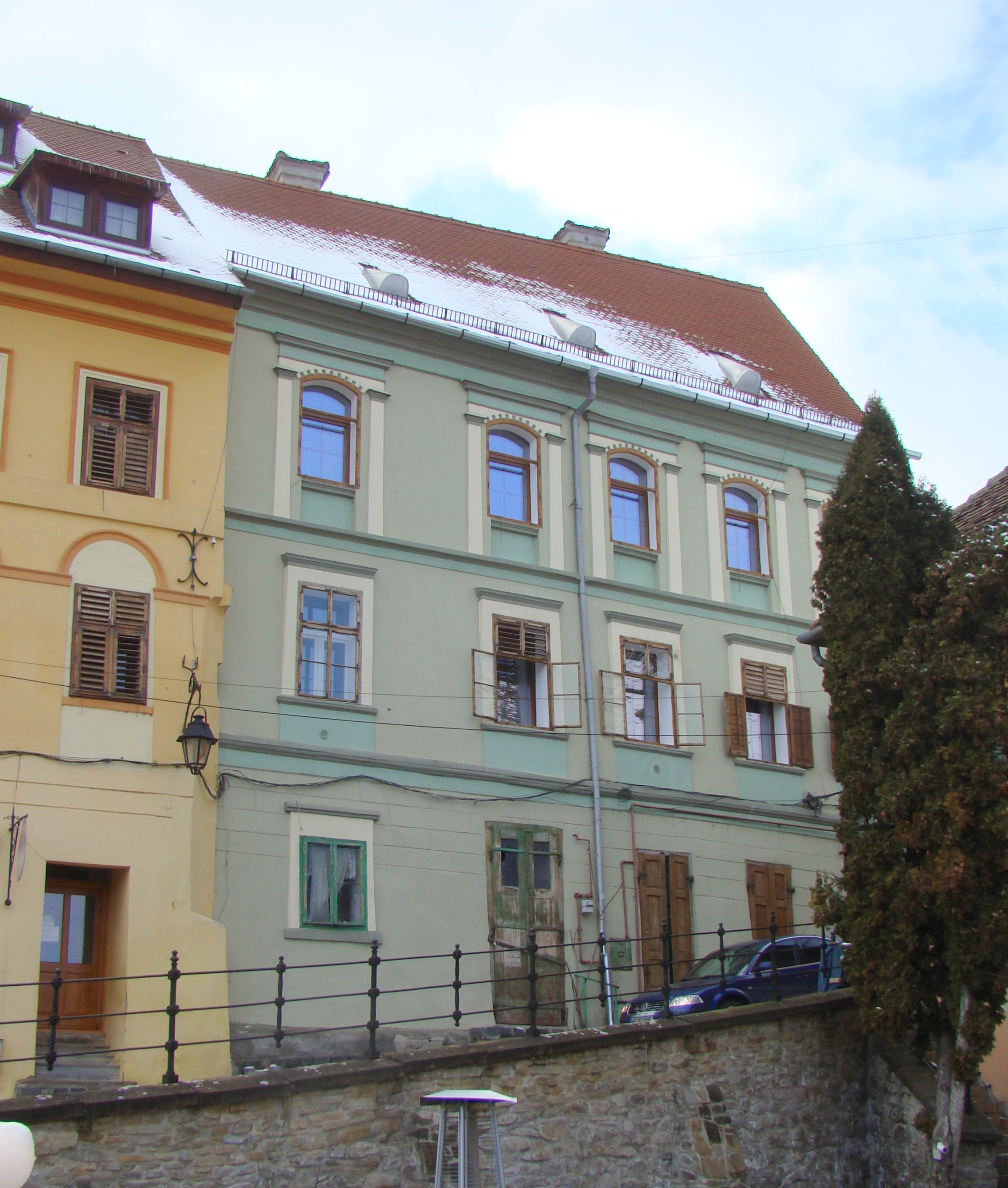 Casa Welther, municipiul Sighișoara, Piața Oberth Hermann 49 sec. XVI